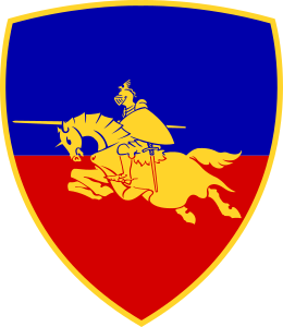 Scudetto della Divisione Corazzata "Pozzuolo del Friuli" (1953 - 1958).